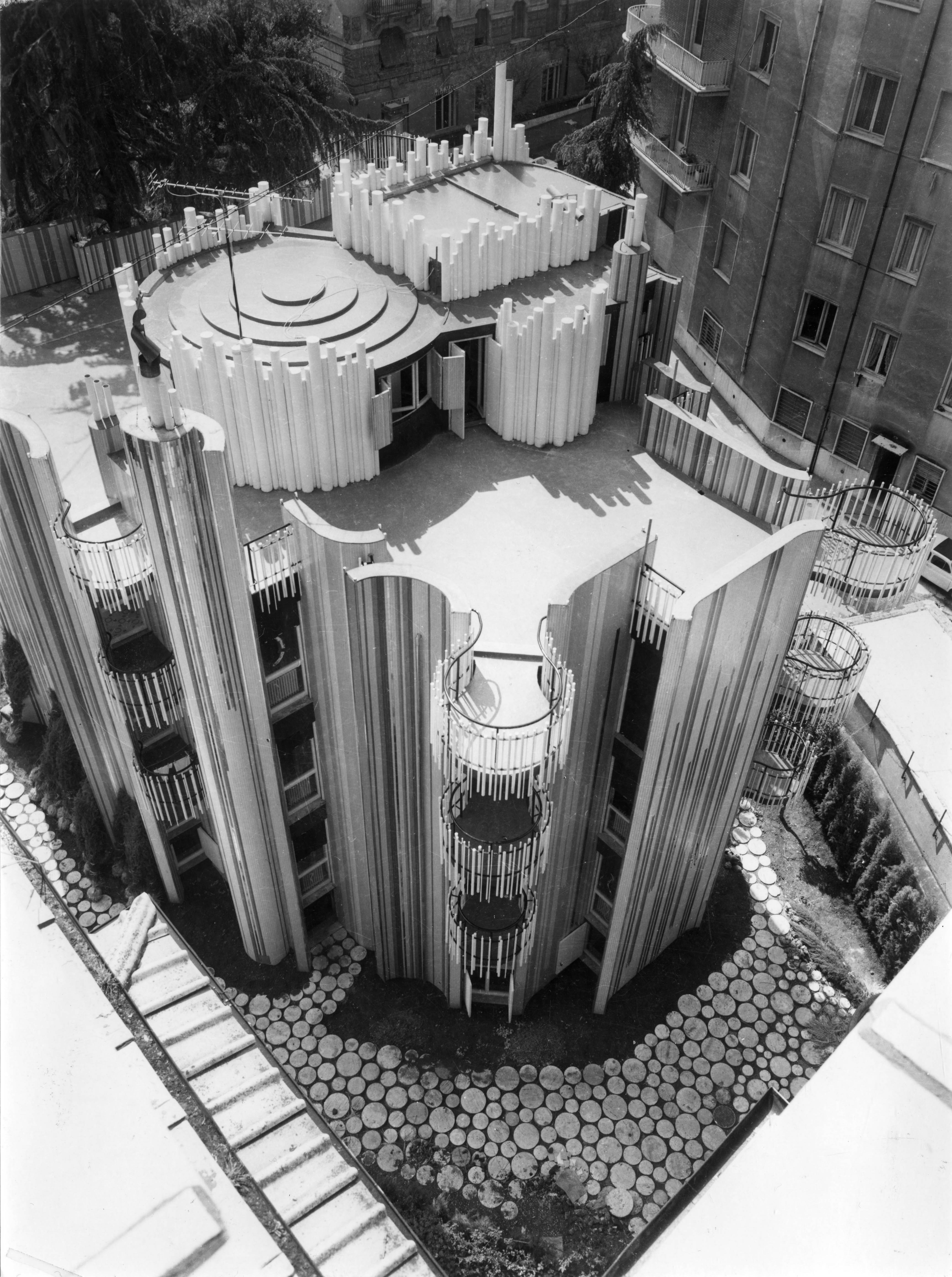 Una tra le più significative opere di Paolo Portoghesi nell'ambito dell'edilizia residenziale, realizzata tra il 1966 e il 1968 in collaborazione con l'ingegnere Vittorio Gigliotti, su incarico ricevuto dall'imprenditore pugliese Pasquale Papanice.